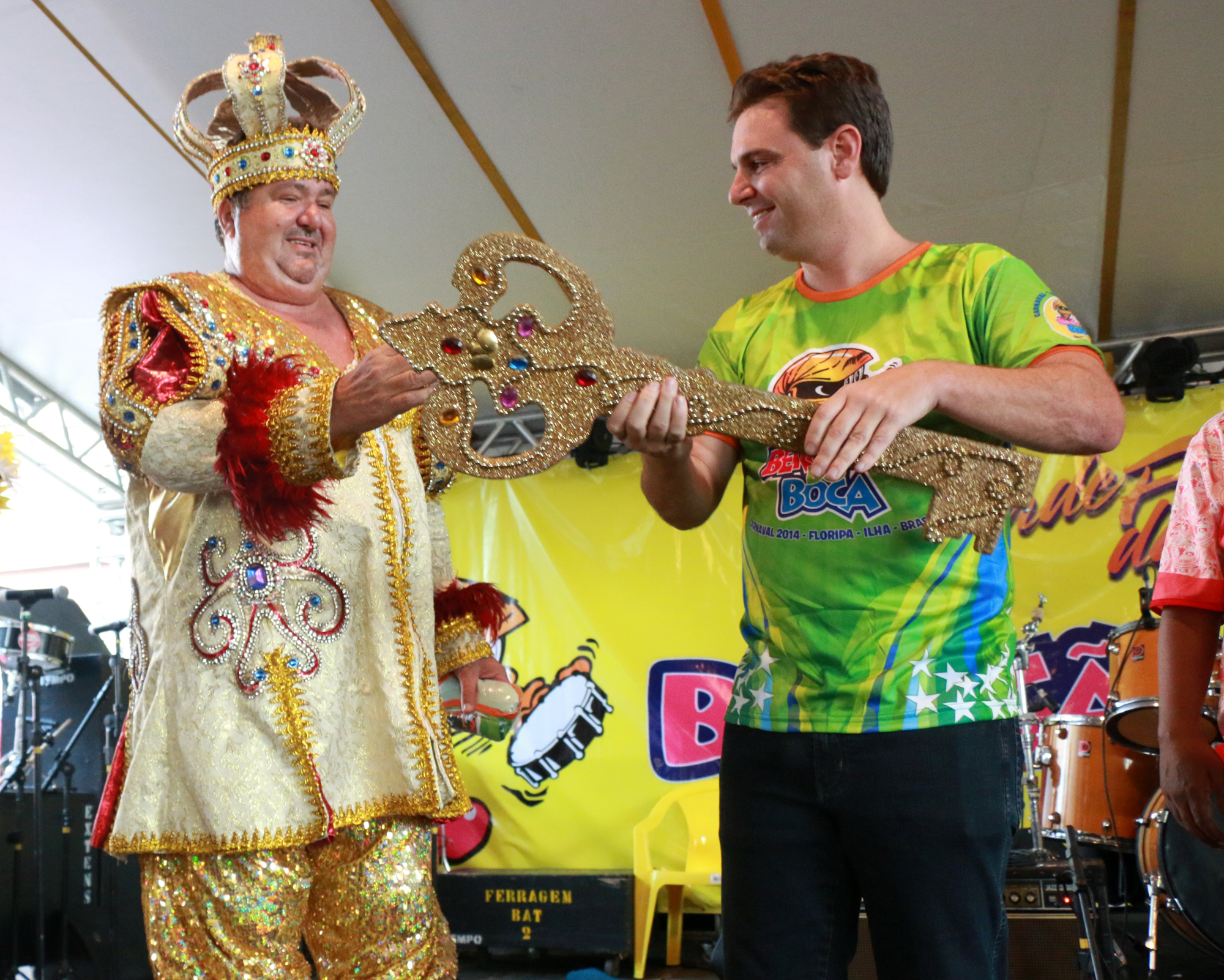 Rei Momo recebe a Chave da Cidade do prefeito, abrindo oficialmente o Carnaval de Florianópolis.